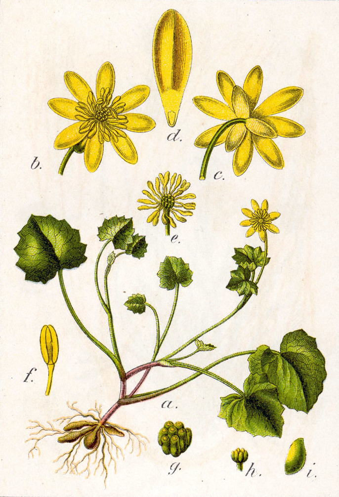 Ficaria verna Huds., syn. Ranunculus ficaria L. Original Description Feigwurz, Ranunculus ficaria